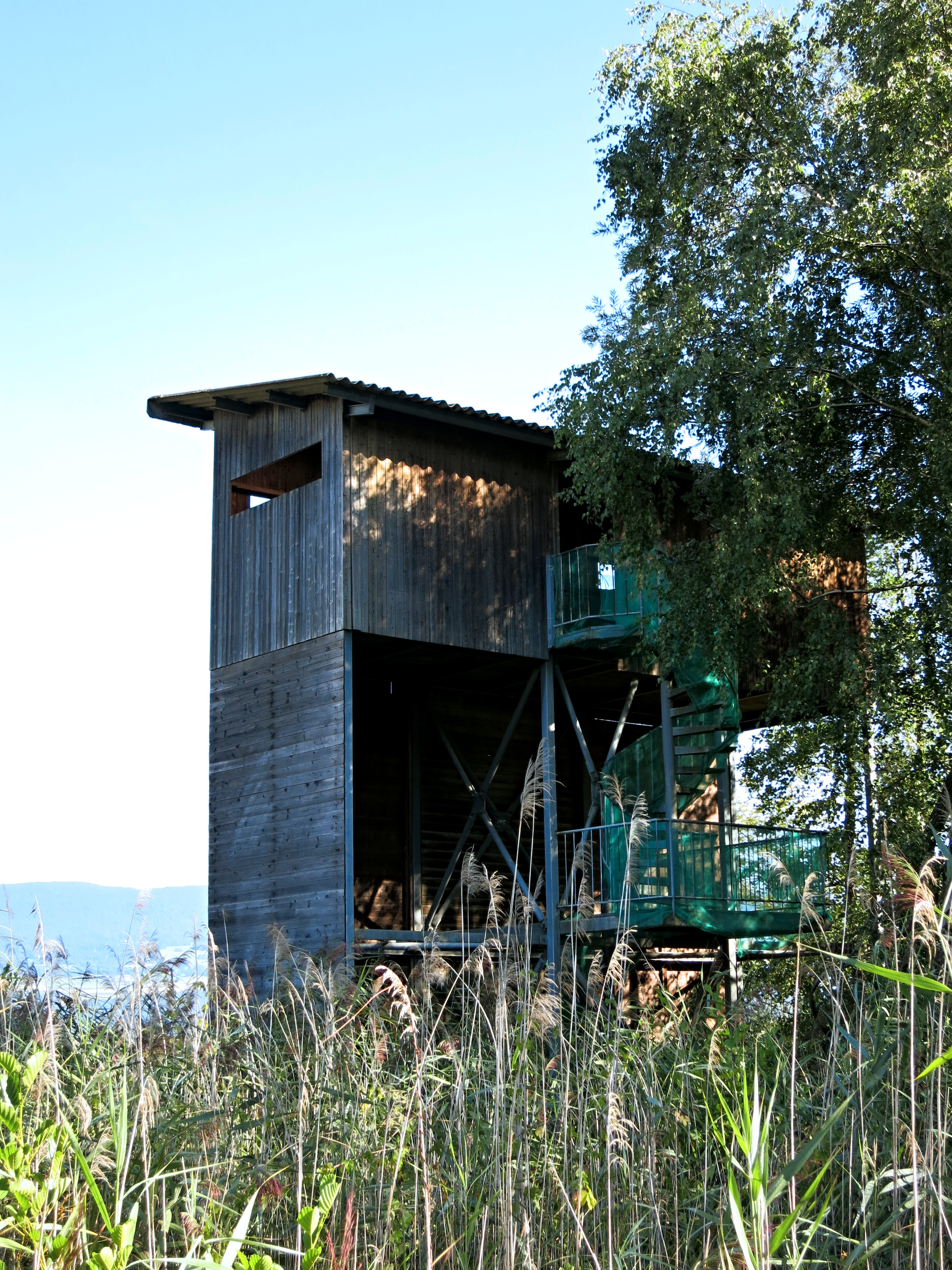 Champ Pittet-Turm